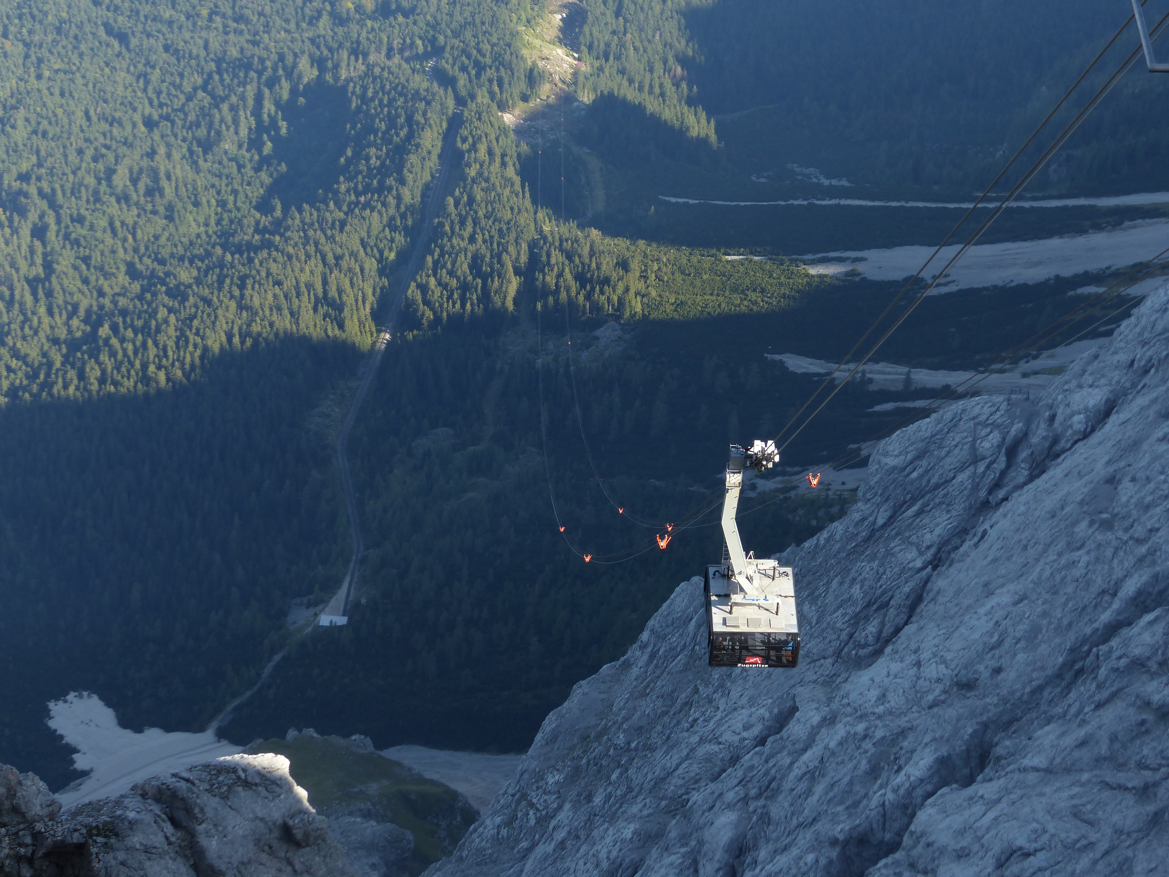 Gondel der Seilbahn Zugspitze. Unten erkennbar die Einfahrt der Bayerischen Zugspitzbahn bei Riffelriss.